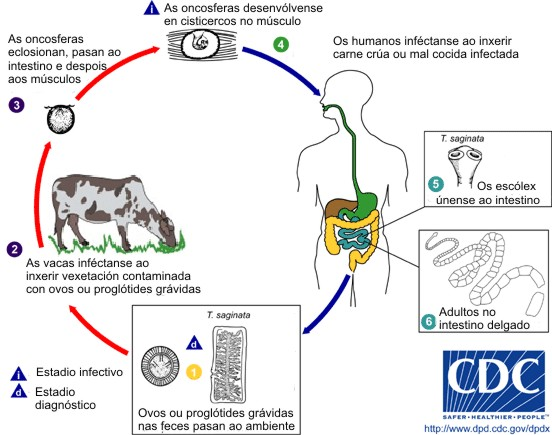 ciclo vital da Taenia saginata translated to Galician